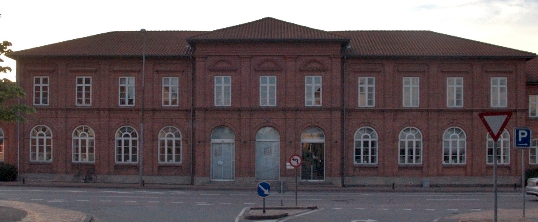 Sydfynske Banegaard is a former railroad station in Odense.